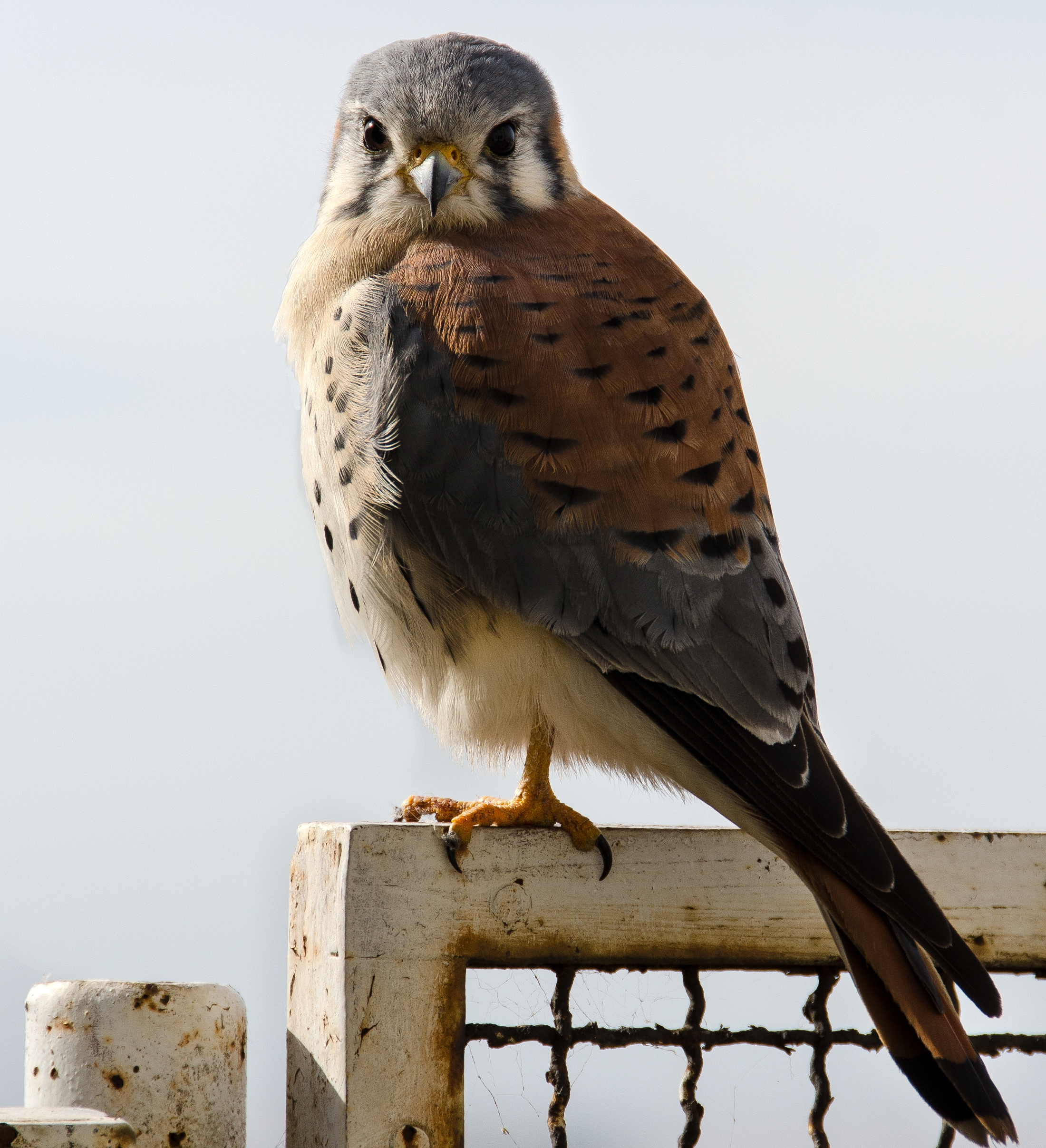 Falco sparverius cinnamonimus en Montevideo, Uruguay